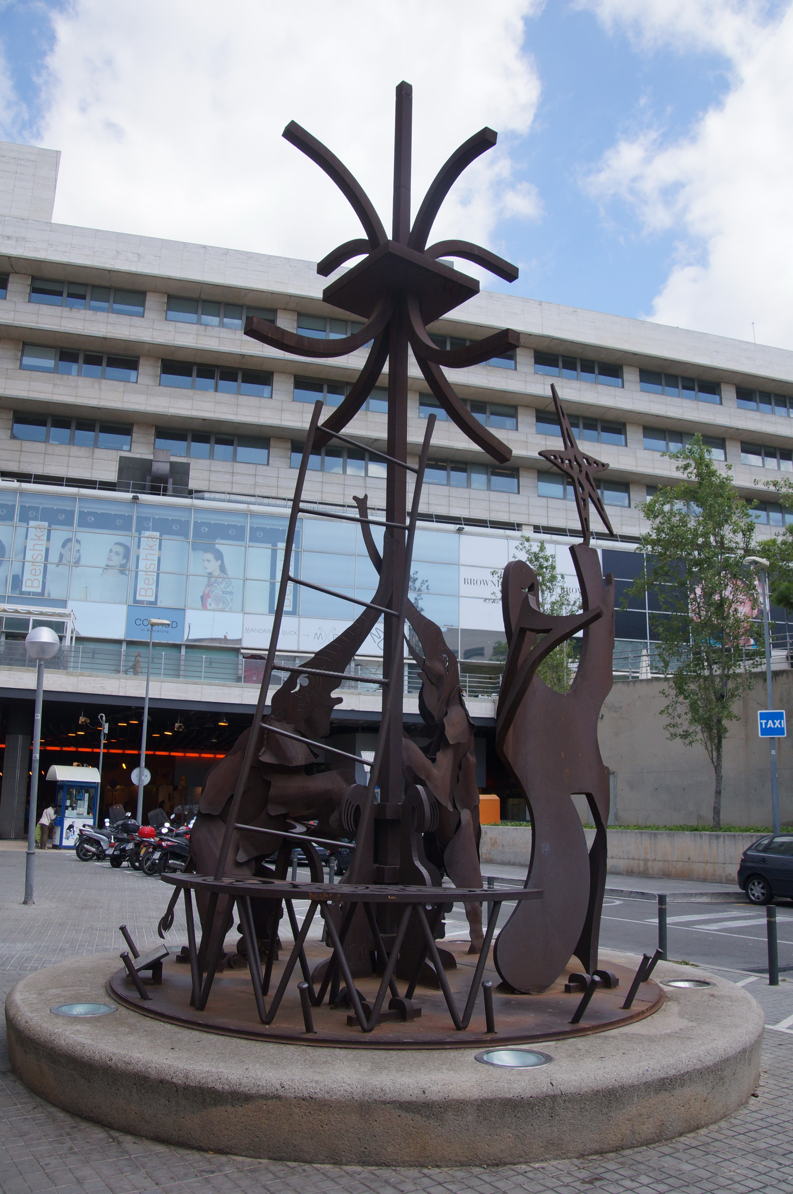 Circ en ferro (Rolf Knie i Miquel Sarasate). C. Constança (Barcelona)